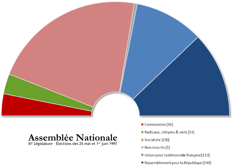 Assemblée Nationale française issue des élections législatives de juin 1997